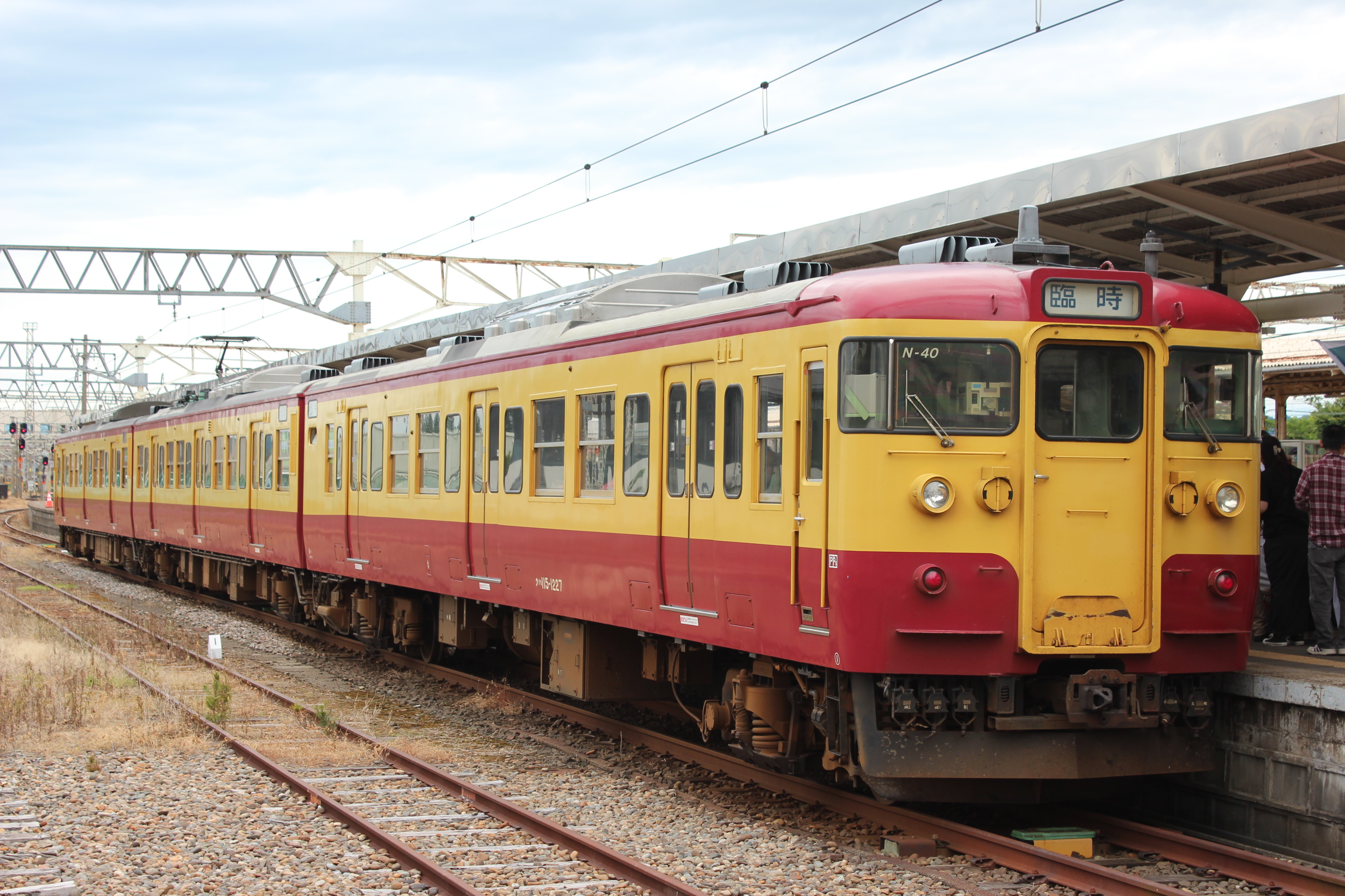 JR東日本 115系、初代新潟色（N40編成）Canon EOS Kiss X5